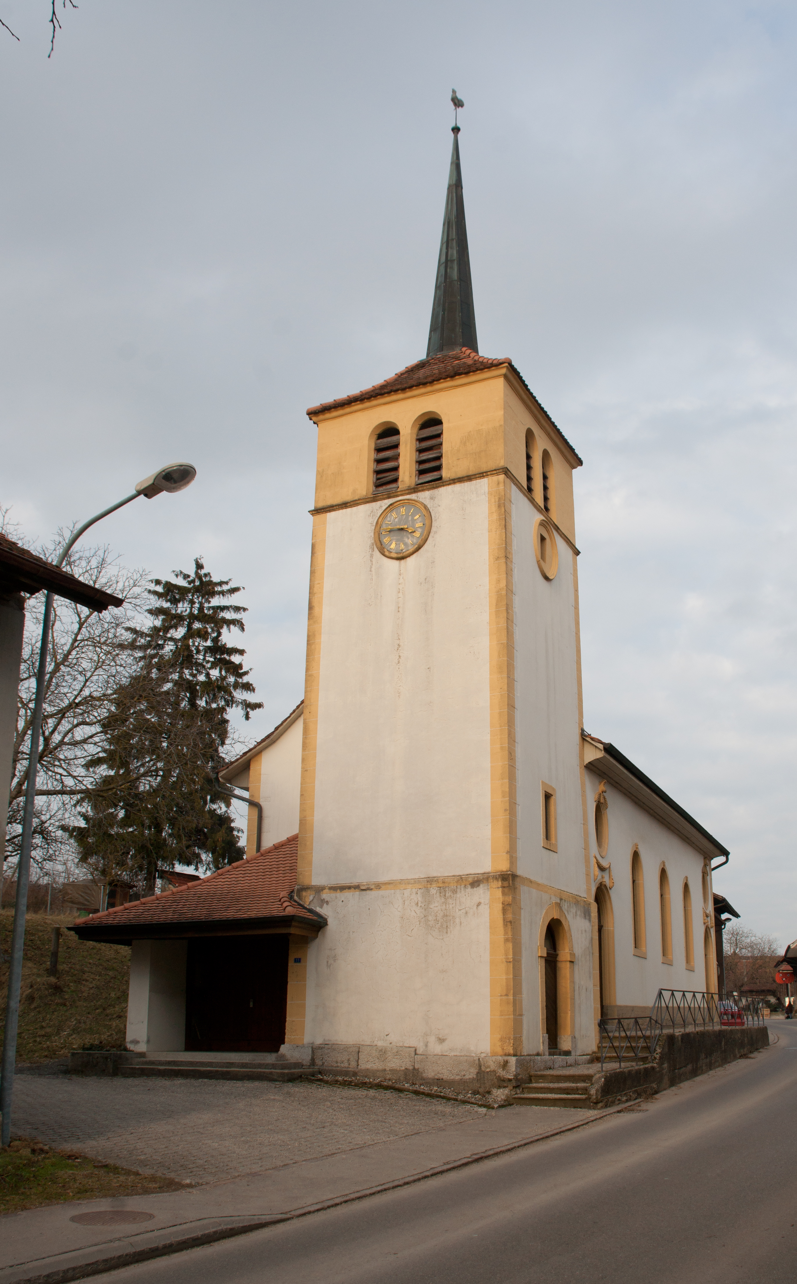 Eglise de Missy.